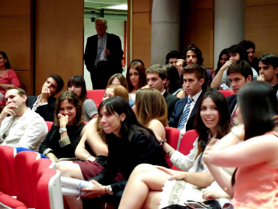 Entrega de los Premios Monseñor Derisi 2013, en la Universidad Católica Argentina